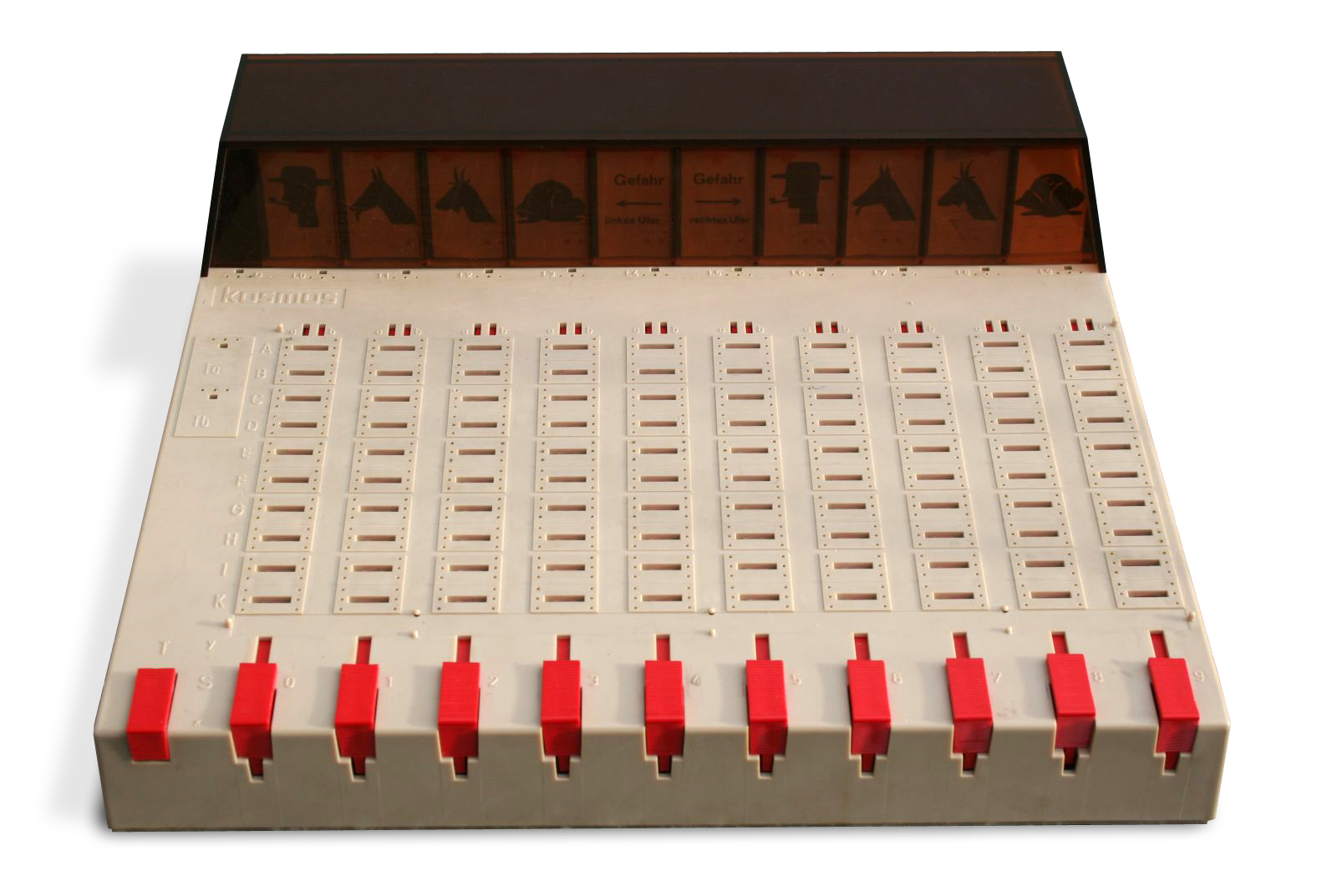 Logikus, aus dem eigenen Bestand für die Wikipedia fotografiert.